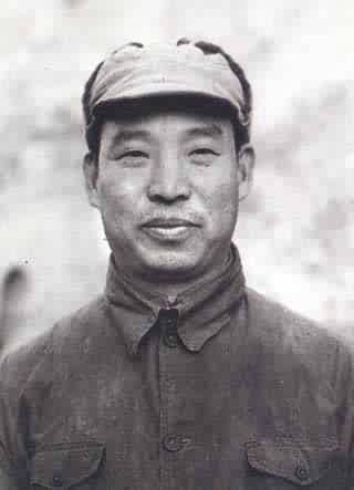 延安时期的彭真